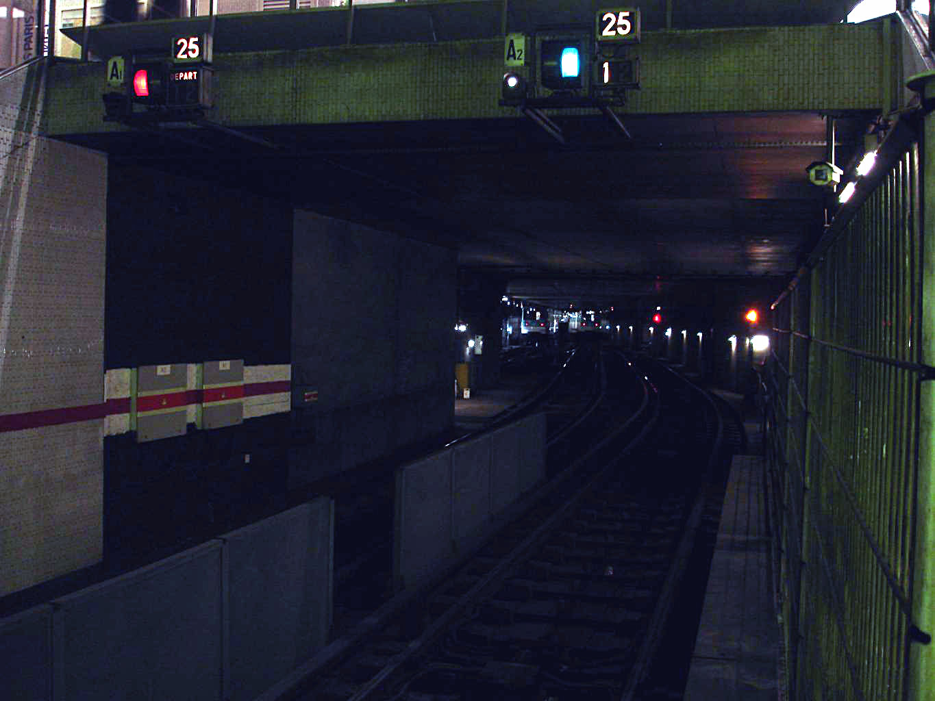 Métro de Paris - ligne 5 - Station Bobigny - Pablo Picasso (France).